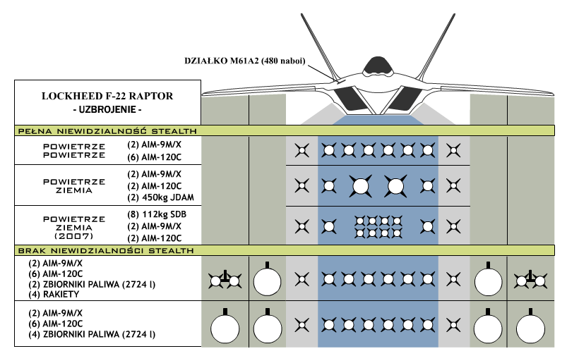 Uzbrojenie Lockheed F-22 Raptor